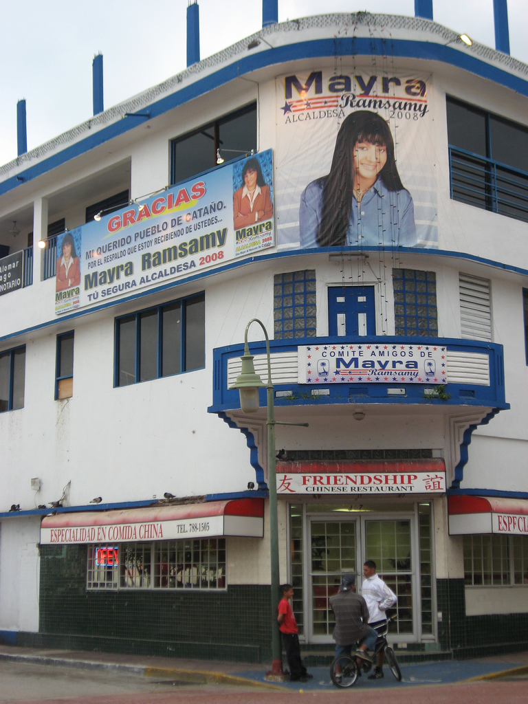 Catano, Puerto Rico